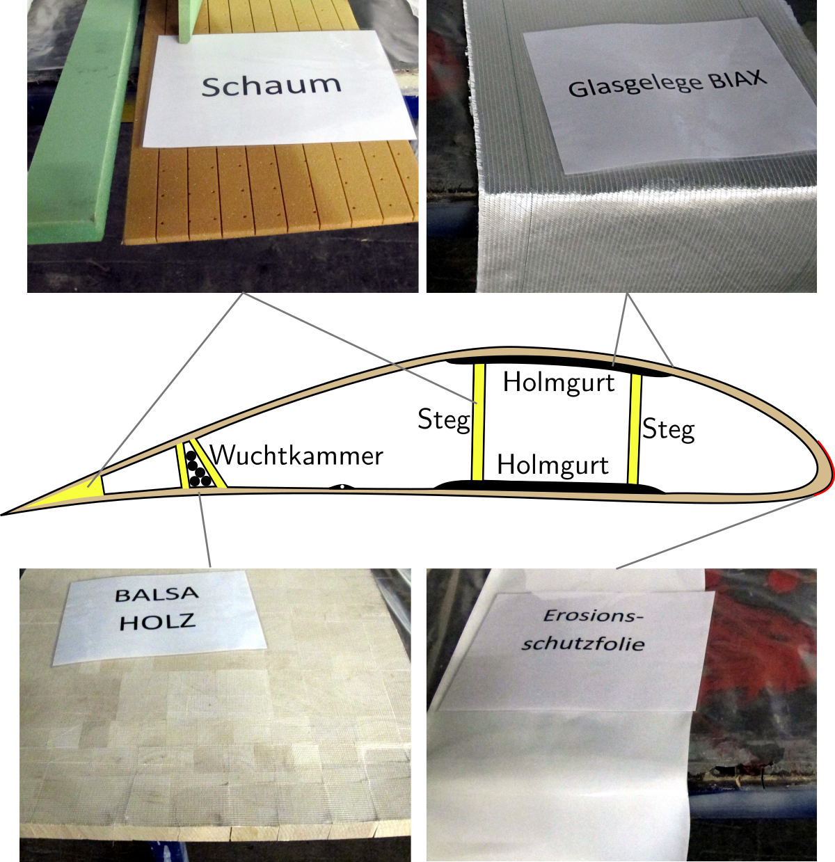 Aufbau eines Rotorblatts für eine Windkraftanlage.